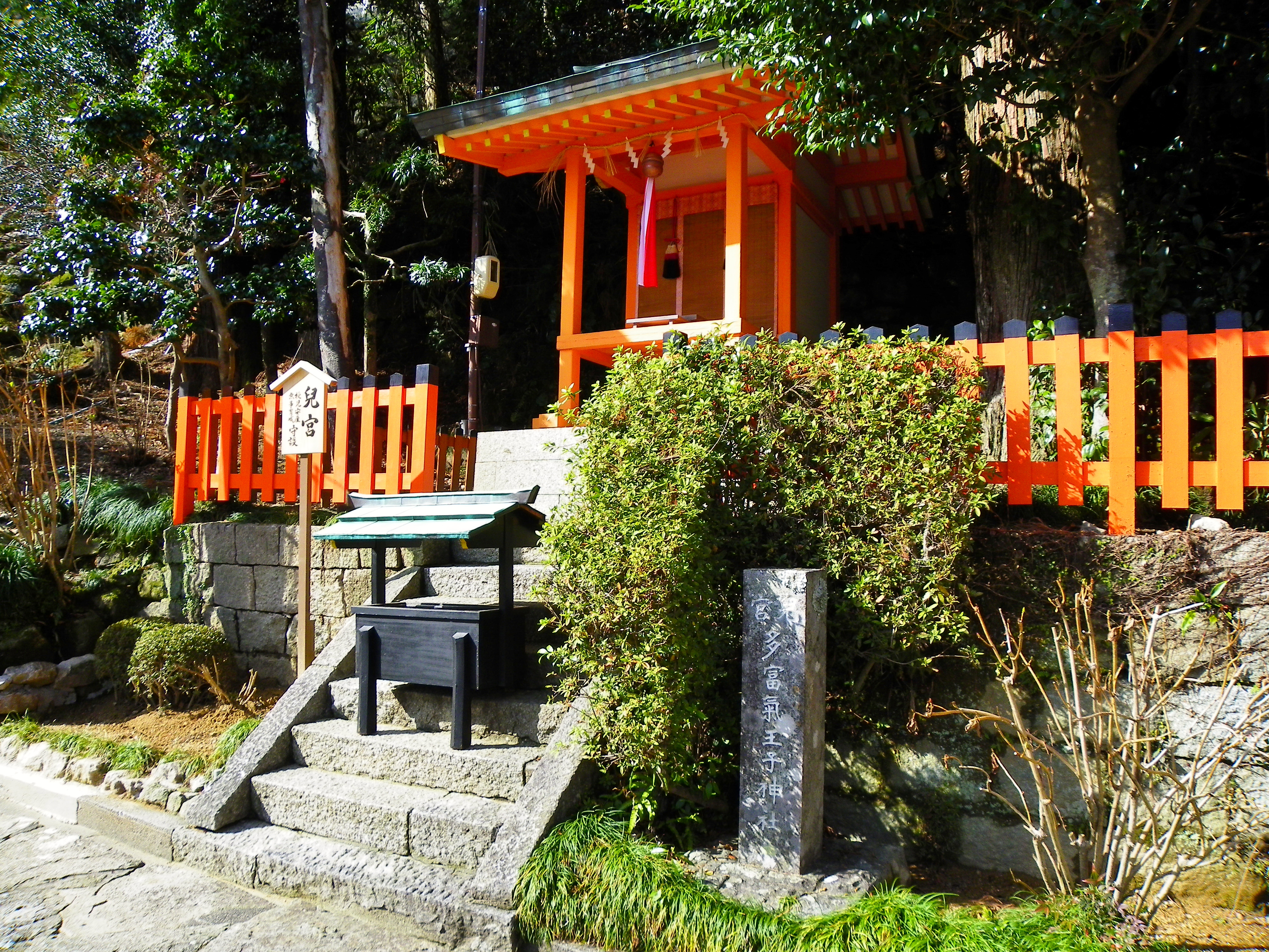 熊野那智大社の摂社児宮（多富気王子神社）。